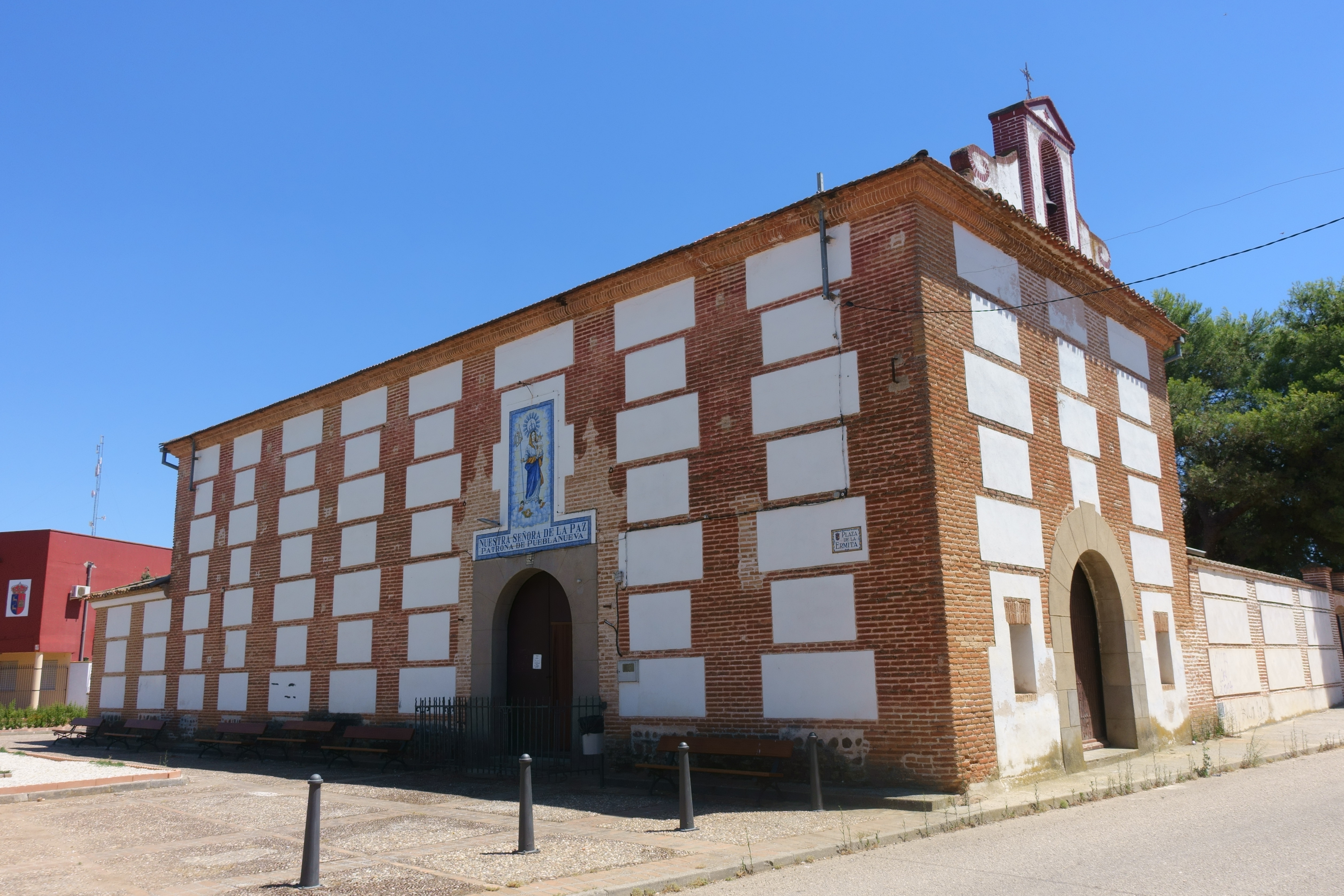 Ermita de Nuestra Señora de la Paz en La Pueblanueva (Toledo, España).